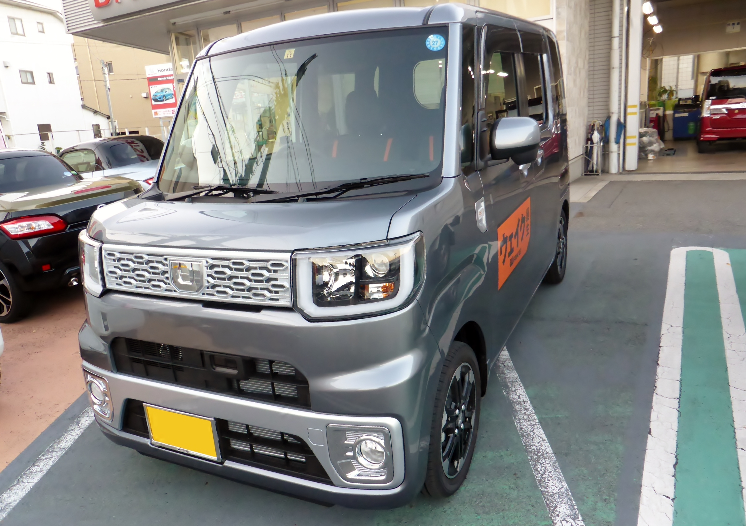 LA700S型ダイハツ・ウェイクG"SA"をフロントから撮影。